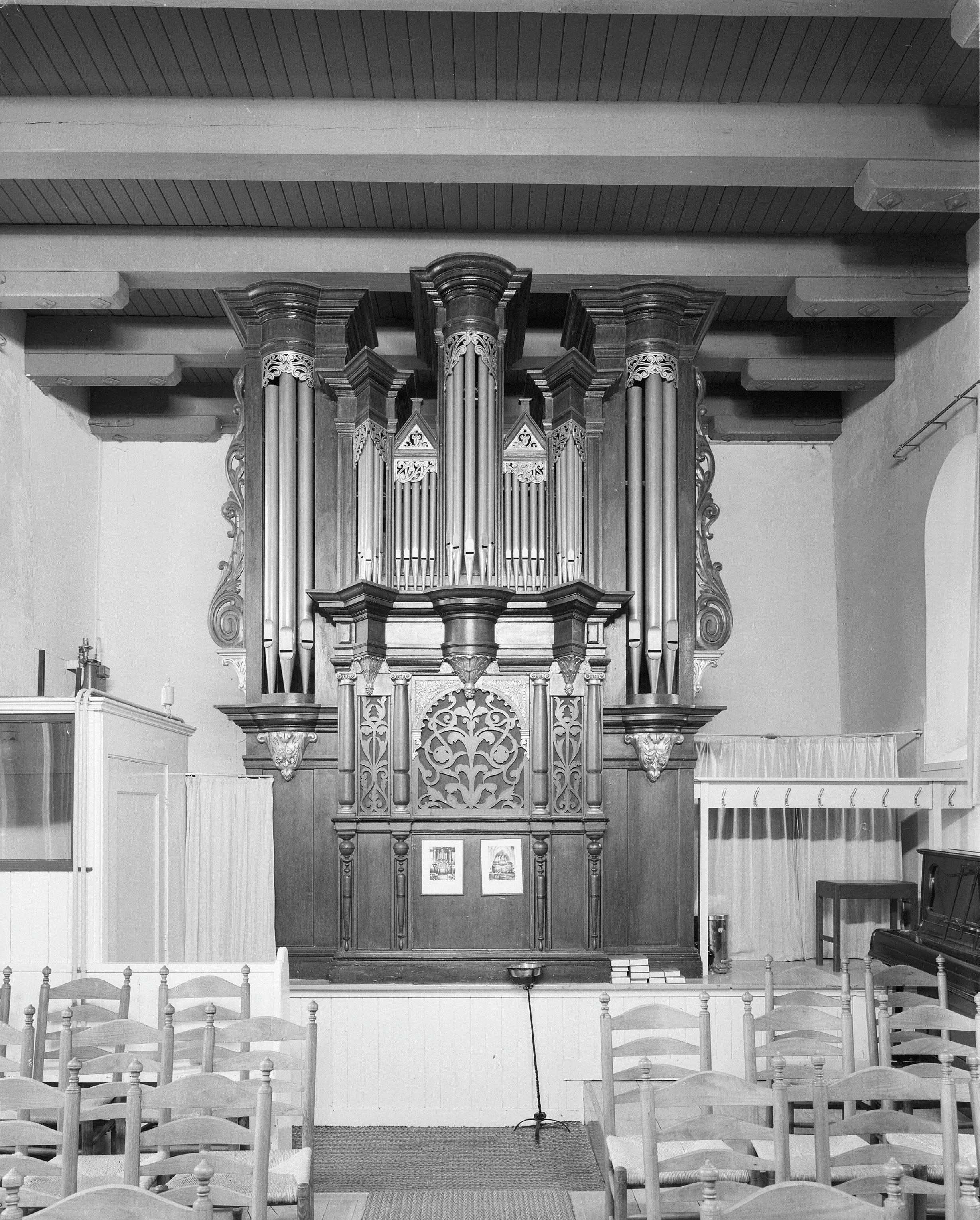 Nederlands Hervormde Kerk: interieur orgel